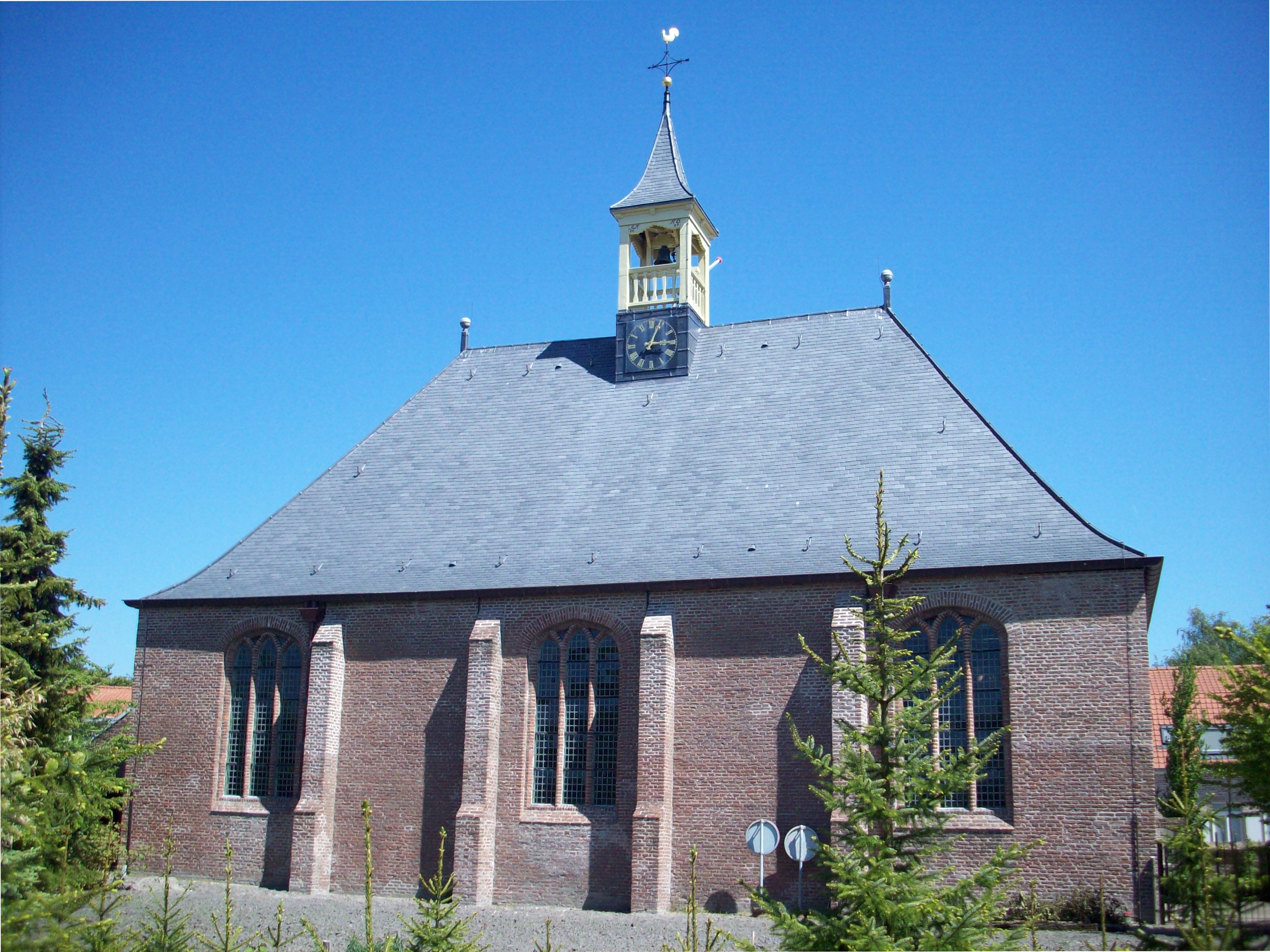 Rijksmonument Retranchement - Kerk